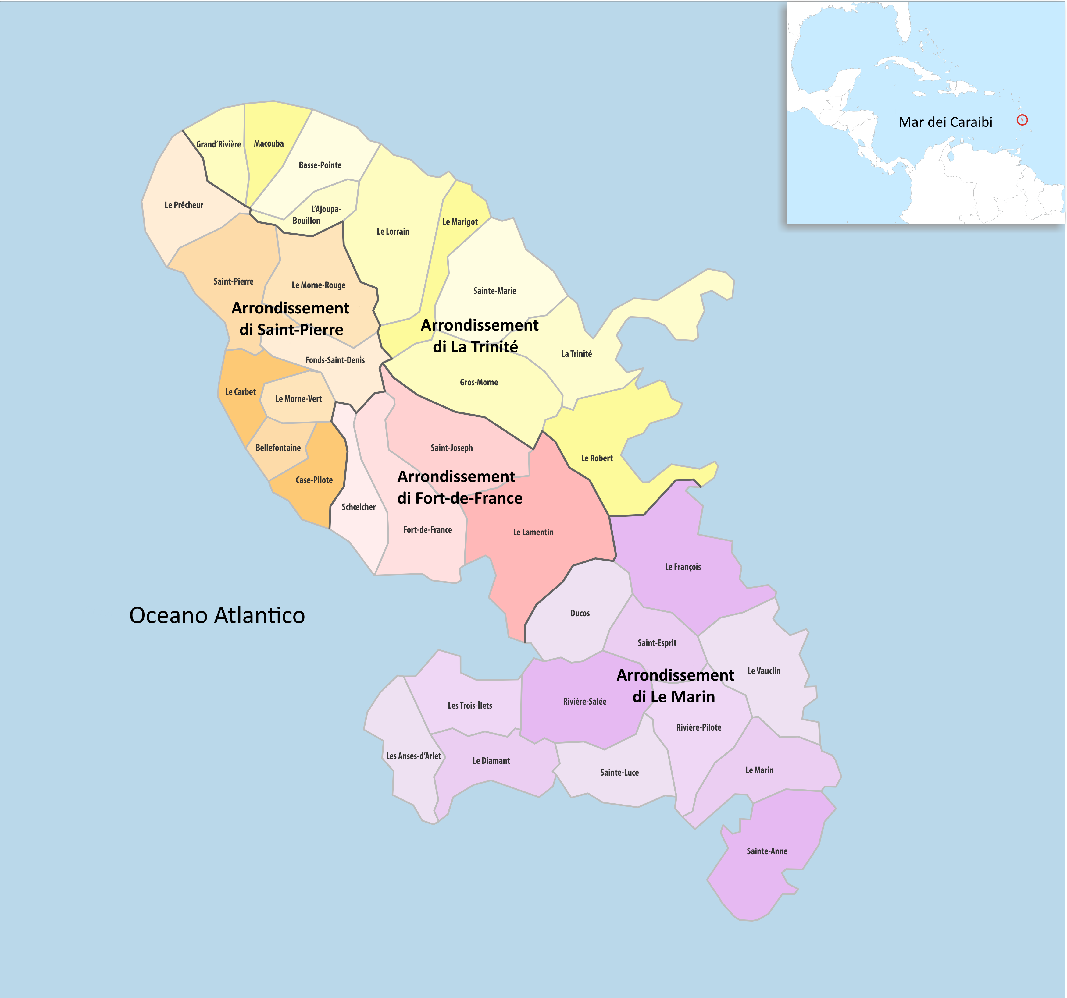 Gemeinden und Arrondissemente in Martinique